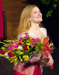 descripción